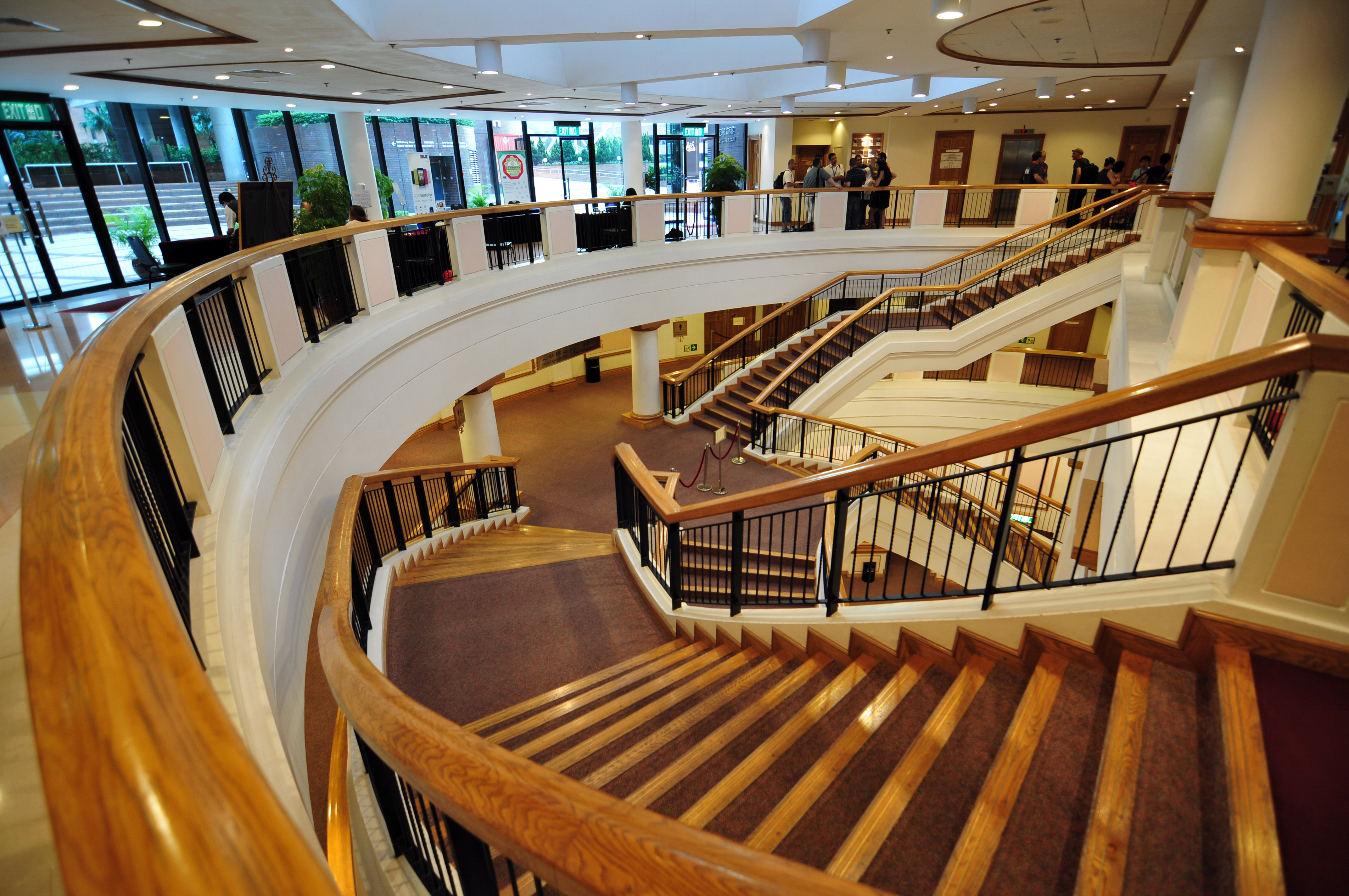 Wikimania 2013 Hongkong